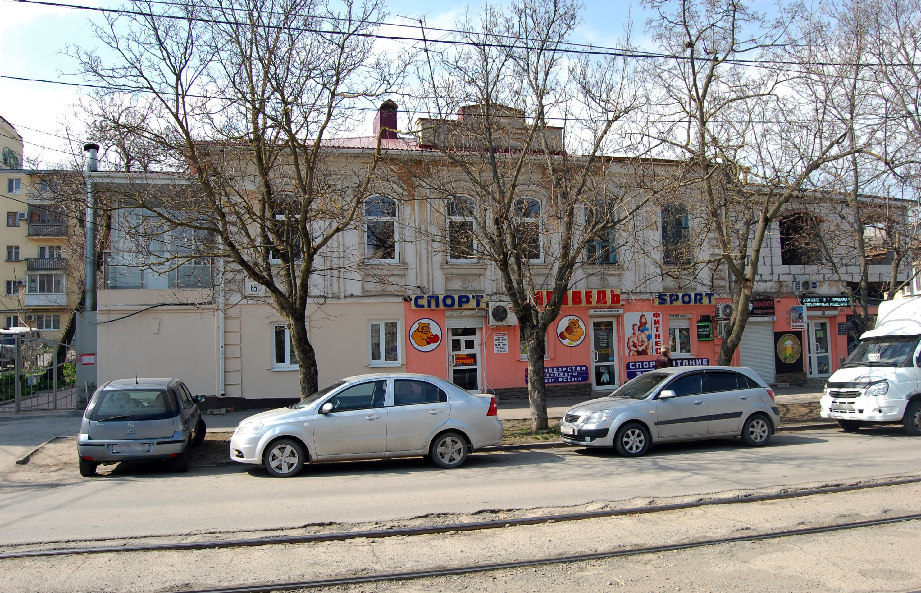 Фасад особняка "Дом Руссо", Таганрог